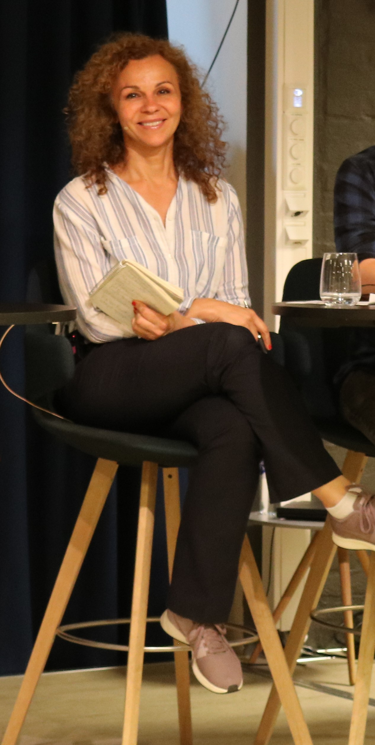 Kari Jaquesson fra en debatt om krisen i Syria i Trondheim, Juni 11, 2018.